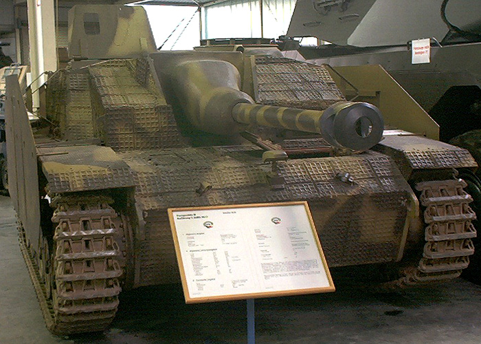 Sturmgeschütz III Ausführung G, späte Version mit Saukopfblende mit Kettenschürzen und Zimmerit-Anstrich ausgestellt in der Wehrtechnischen Studiensammlung Koblenz